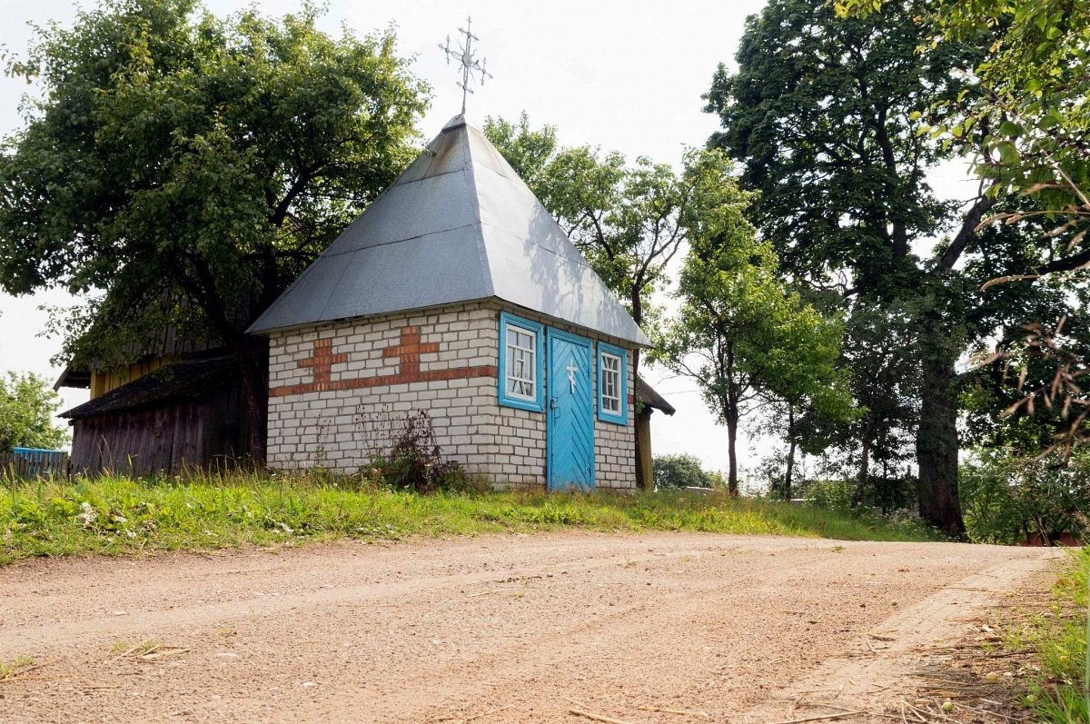 Баяры. Капліца